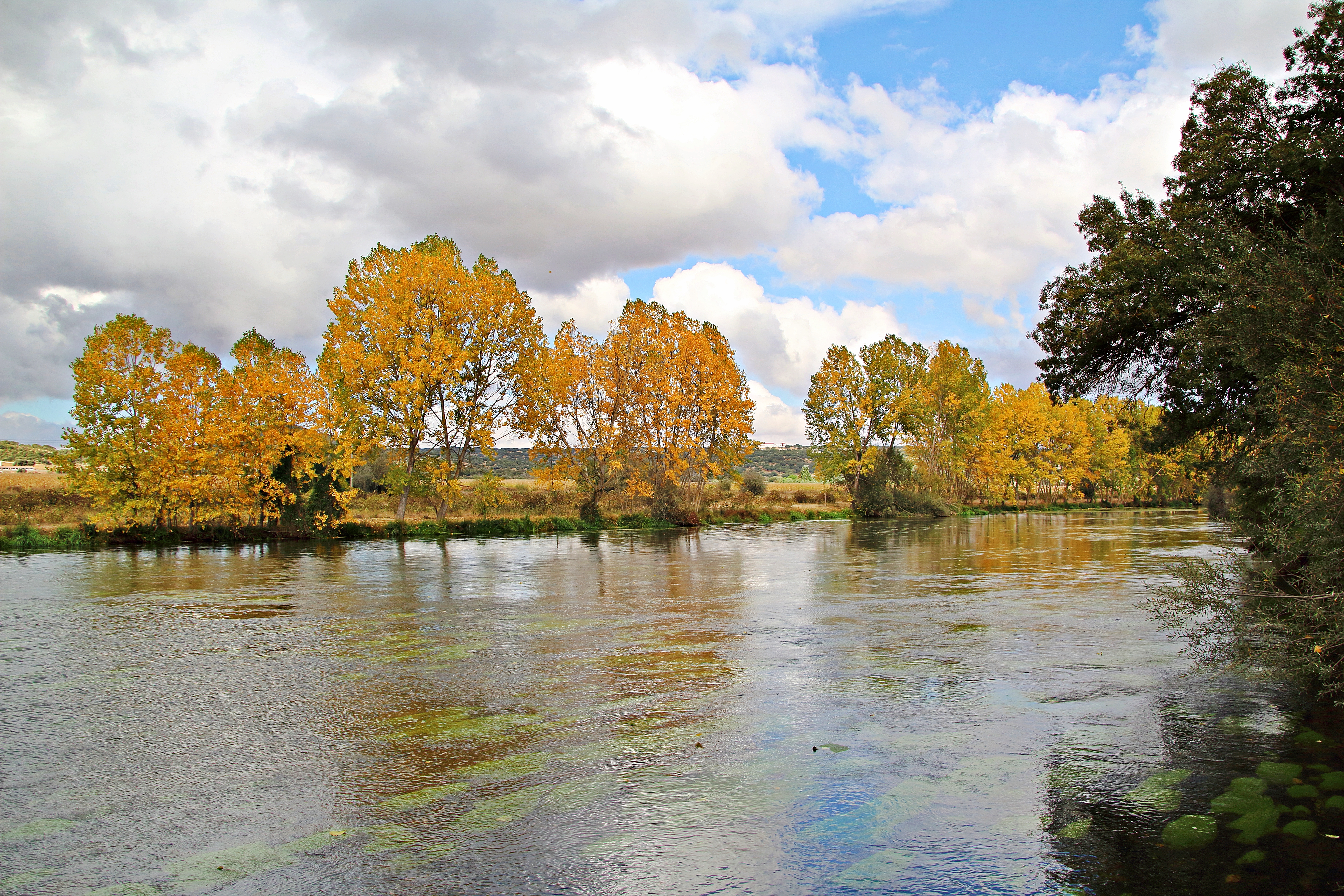 Río Tormes en el municipio de Éjeme, perteneciente a la comarca Tierra de Alba, en la provincia de Salamanca.